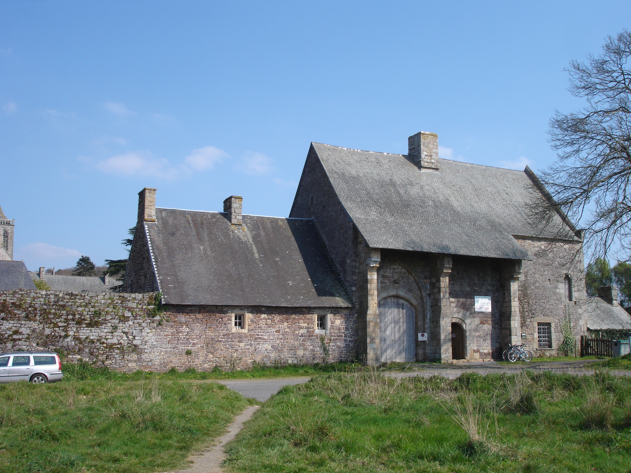 France, Manche (50), Abbaye de la Lucerne d'Outre Mer, entrée